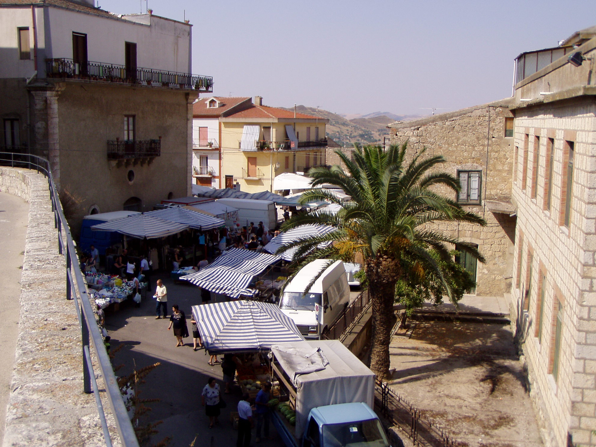 Mercado de Alimena Martin Teetz, 2003